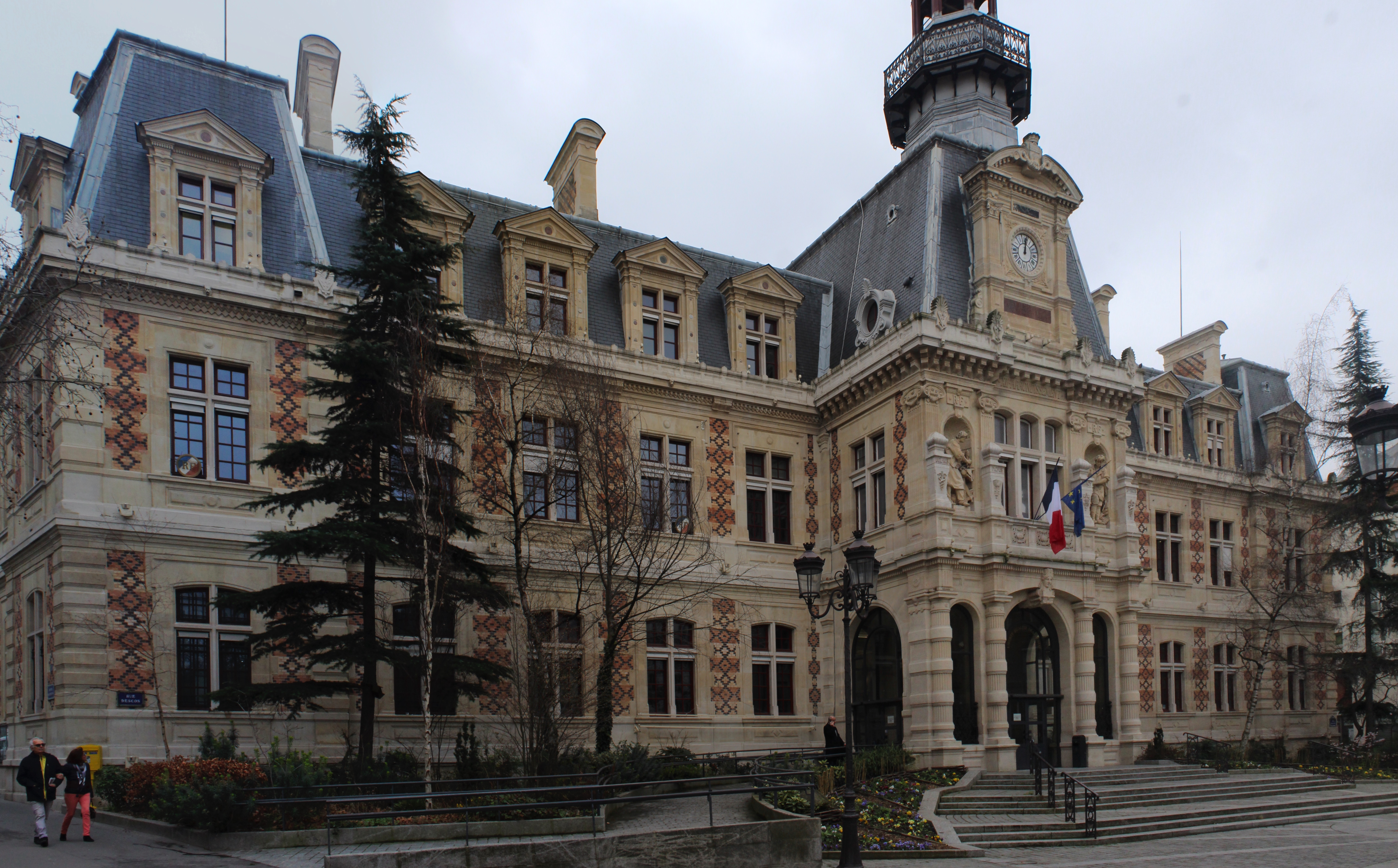 Mairie du 12e arrondissement à Paris.